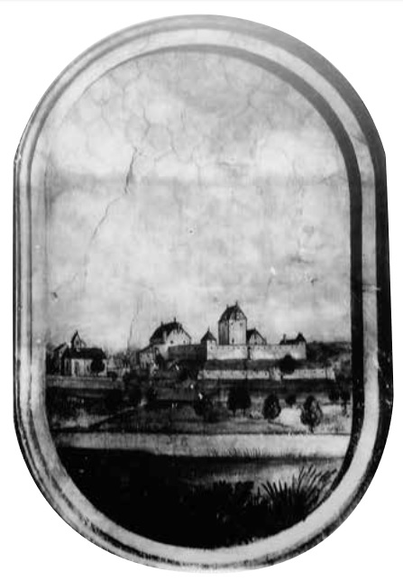 Burg Schwaben, Fresko im Antiquarium der Münchner Residenz